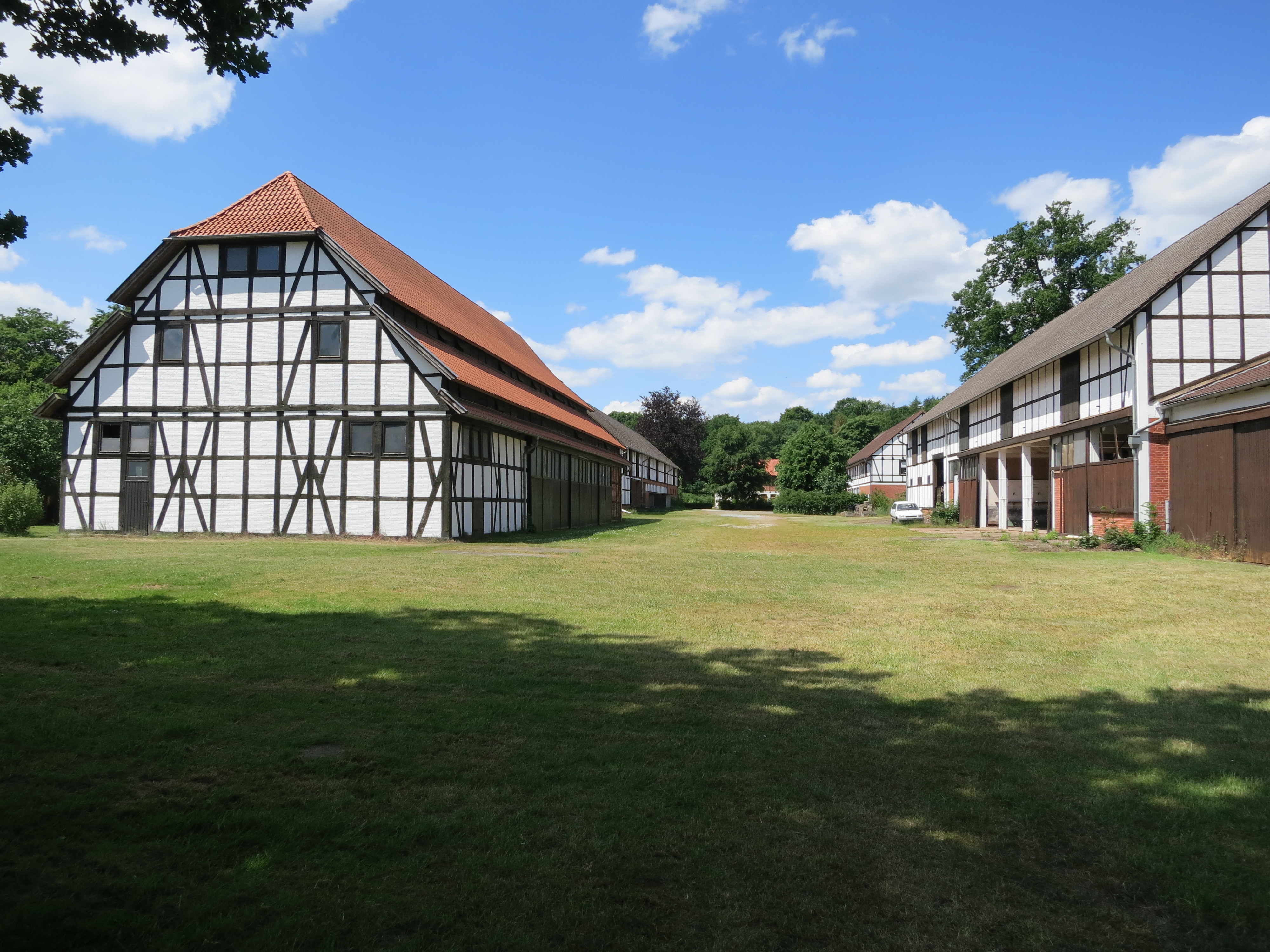 Fachwerkhäuser des Gutshofs Sudweyhe in Weyhe-Sudweyhe im Mühlengrunde